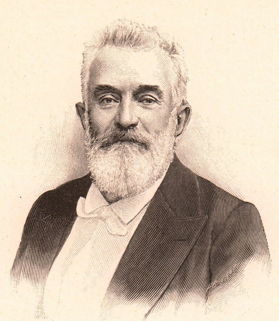 French naturalist and colonial administrator Jean-Marie de Lanessan (1843-1919). Full name : Jean-Marie Antoine Louis de Lanessan (a.k.a. Jean-Louis de Lanessan).